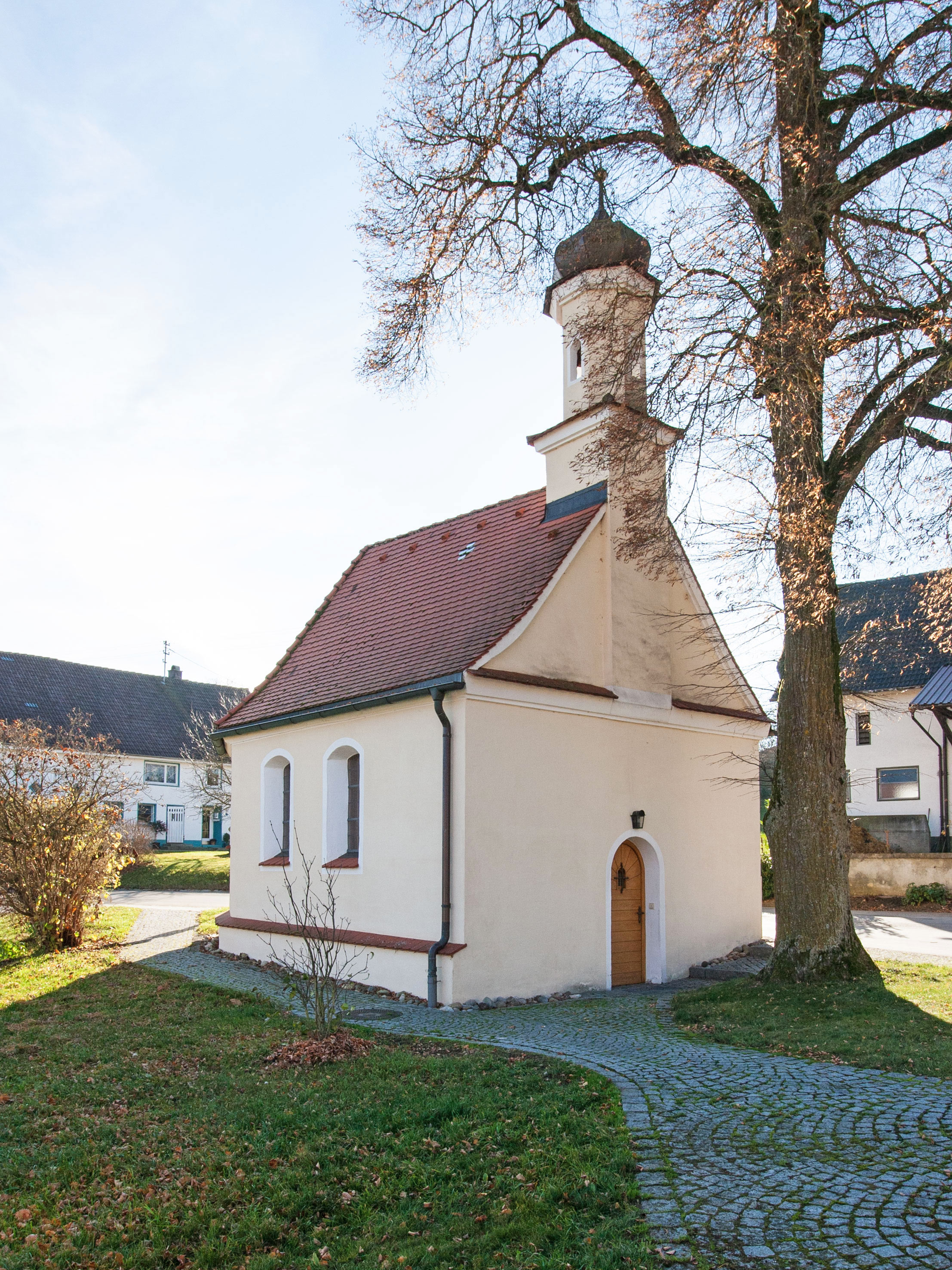 Kath. Kapelle St. Franz Xaver in Weiler bei Waltenhausen von Nordwesten gesehen